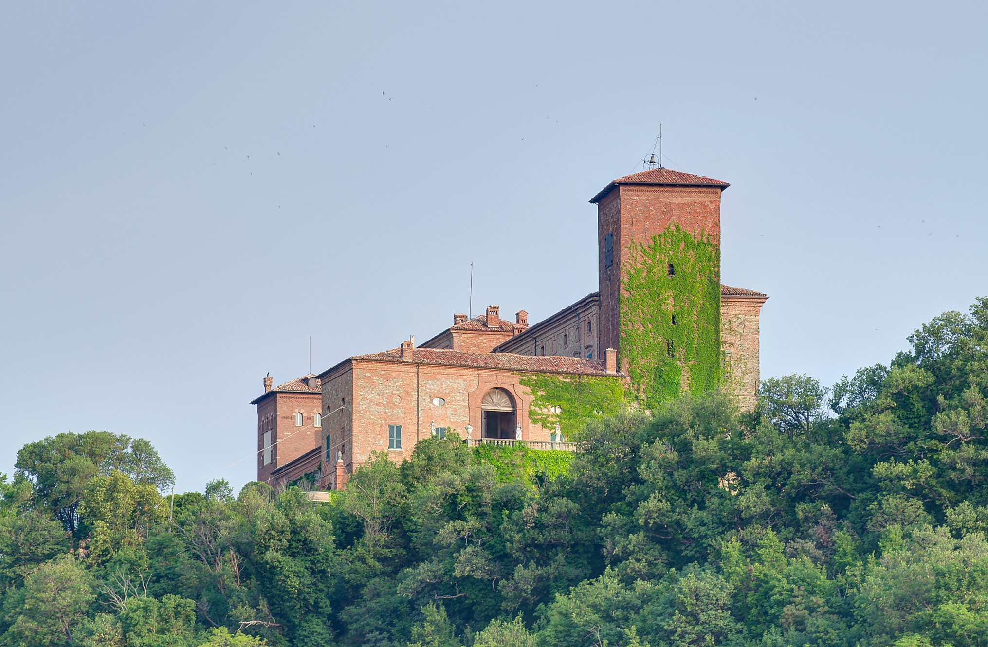 Il Castello